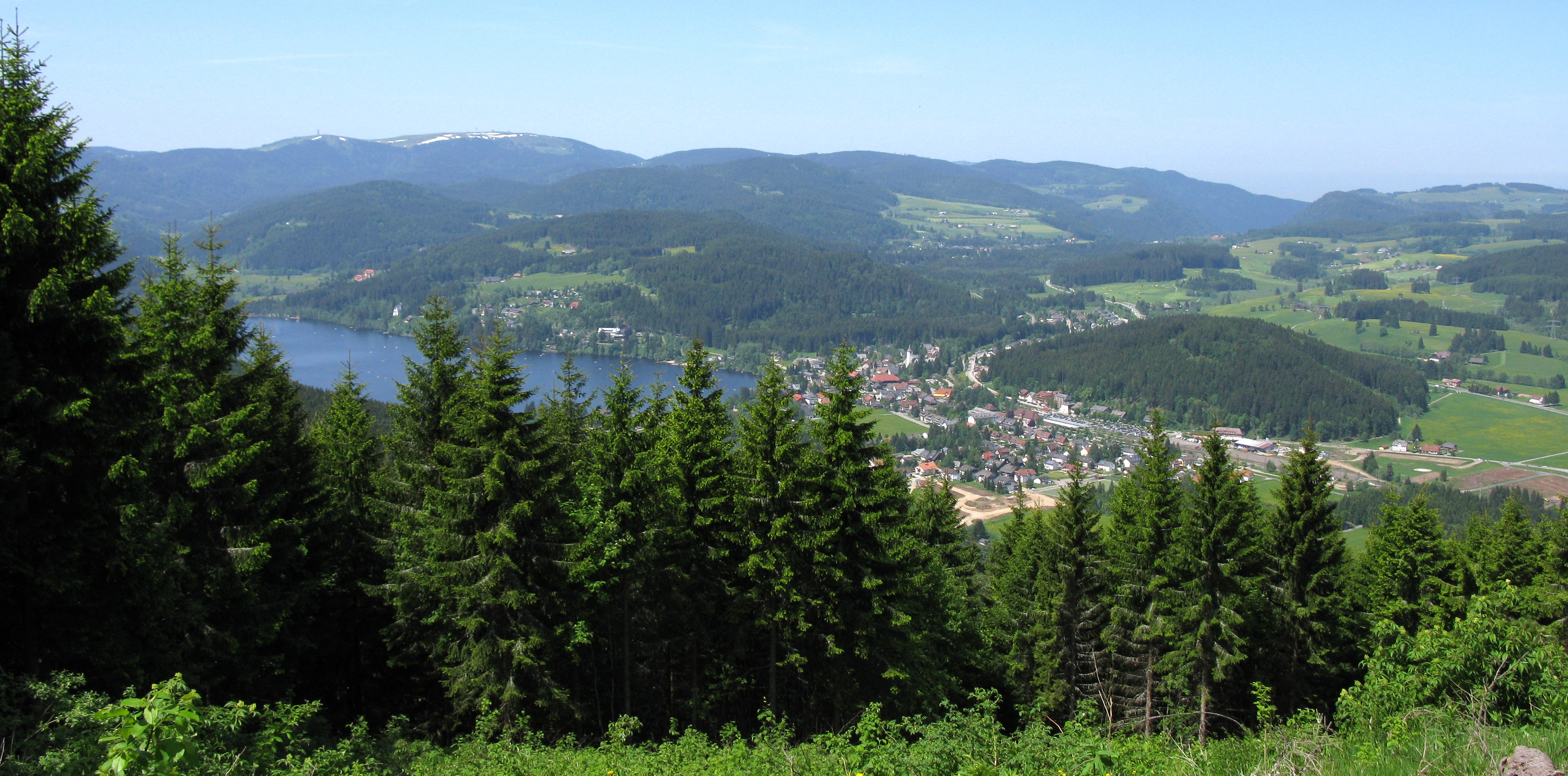 Panorama vom Hochfirst mit Feldberg, Titisee und dem Ort Titisee